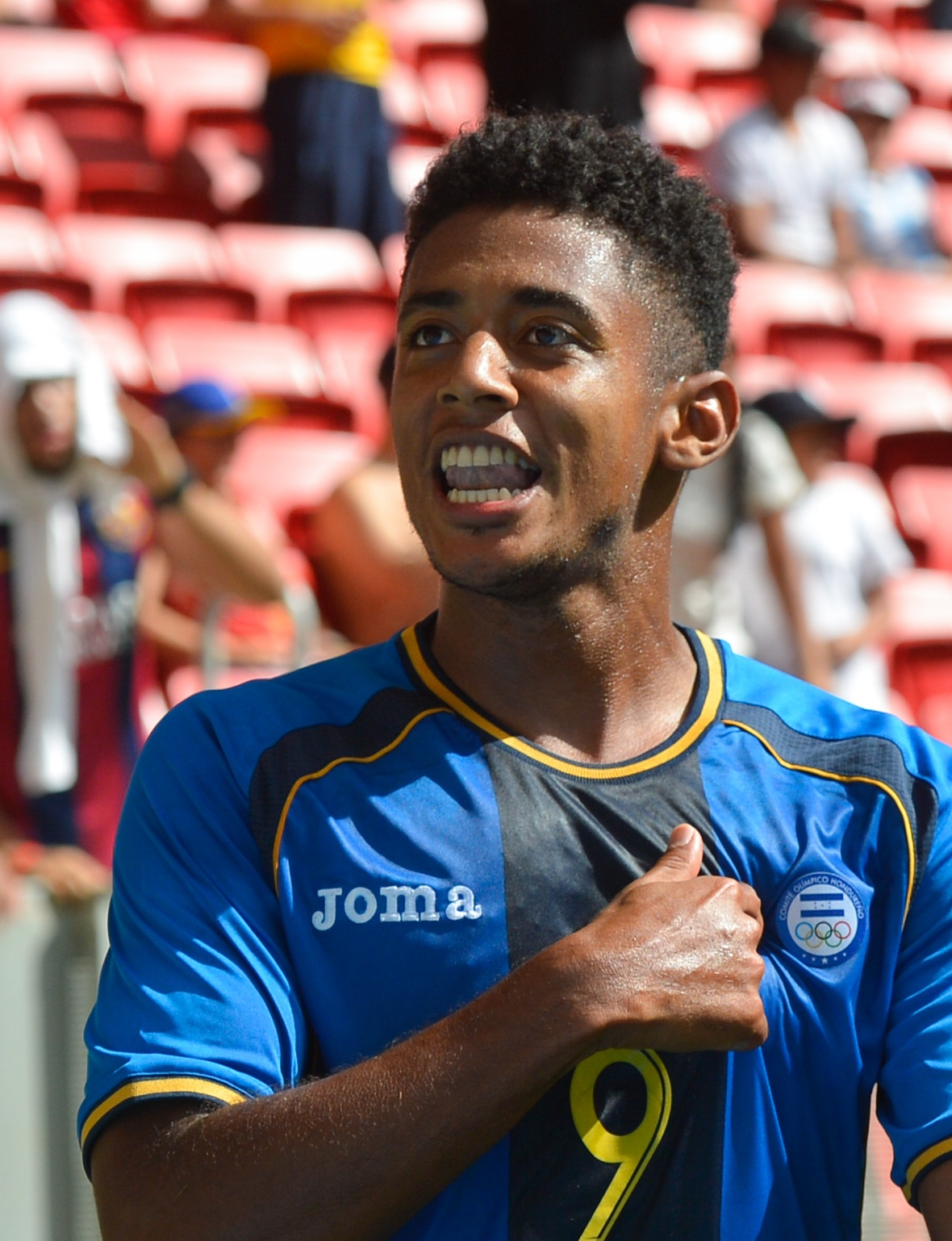 Português do Brasil: Brasília - Equipes masculinas do futebol olímpico da Argentina e Honduras jogam no Estádio Mané Garrincha (Gustavo Gomes/Agência Brasil)